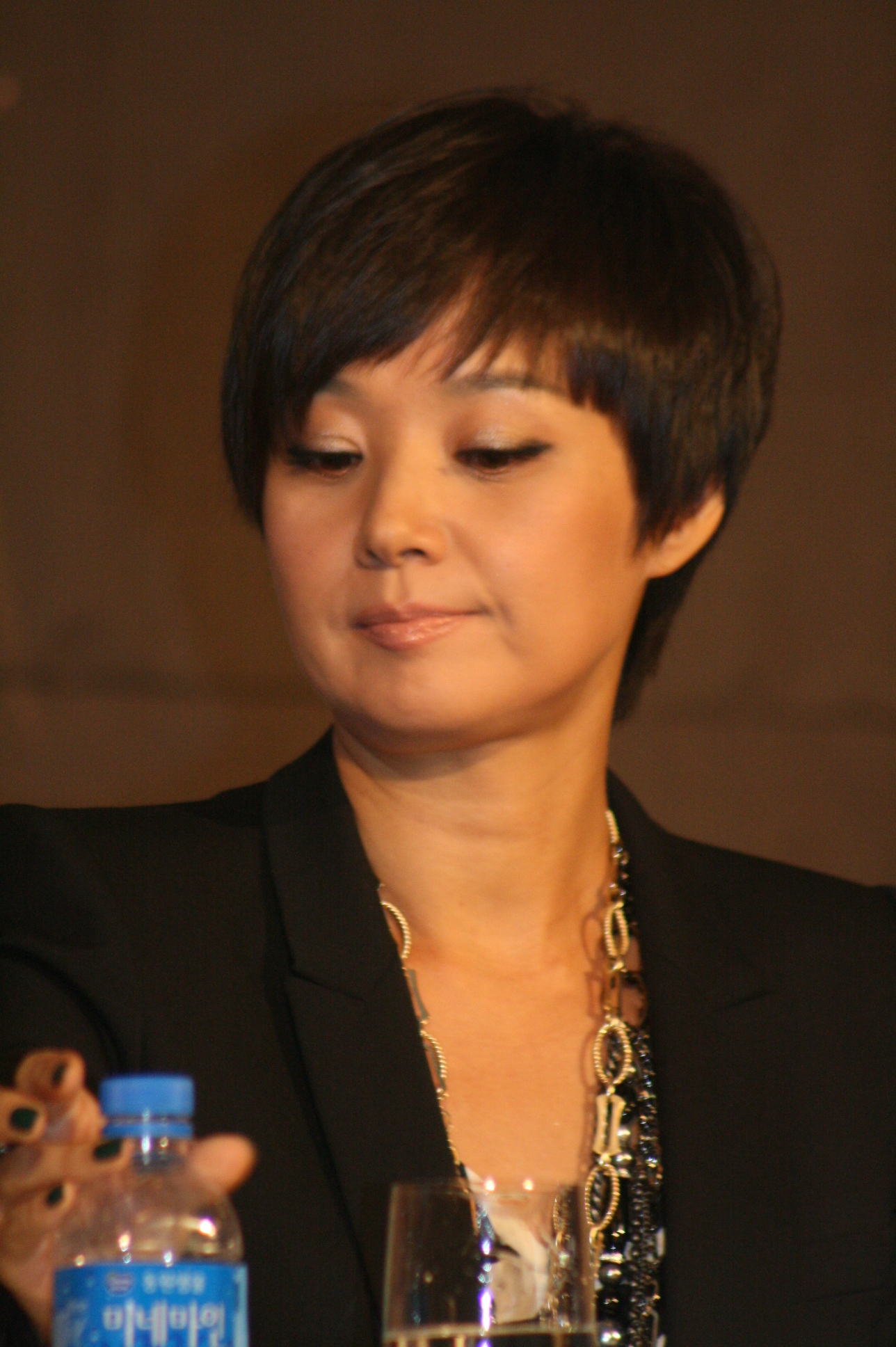 사진 041